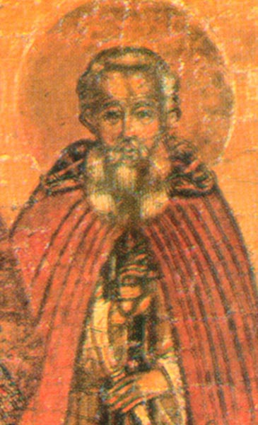 Фрагмент с иконописного подлинника: cвт. Иоанн Златоуст, вмч. Димитрий и прп. Мартирий Зеленецкий. Россия. XVIII в. Собрание ЦАКа МДА.